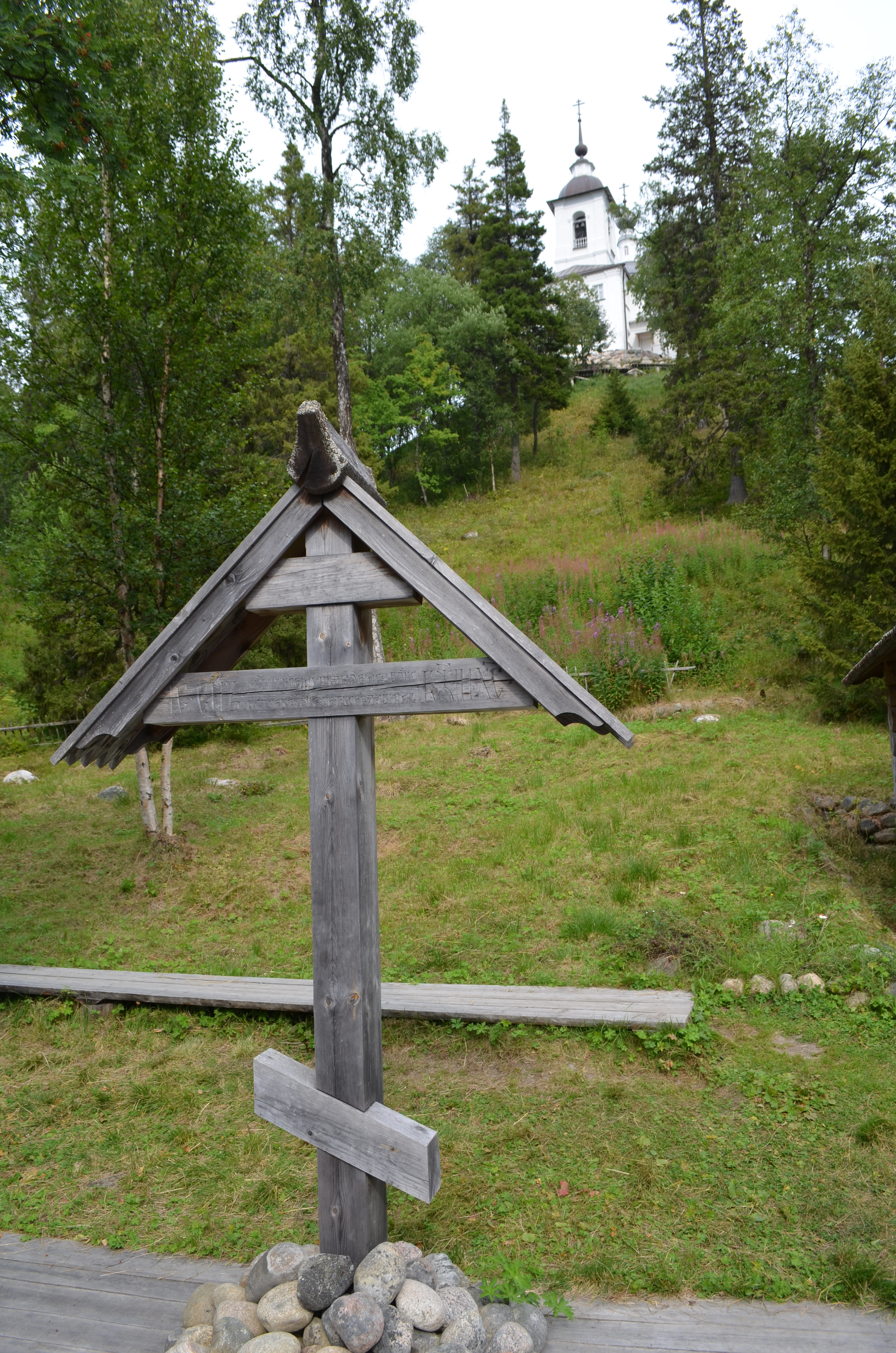 Голгофо-Розп’ятський скит (острів Анзерський)